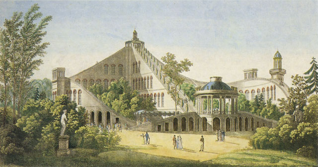 Les "montagnes françaises" dans le parc de la Folie Beaujon à Paris.